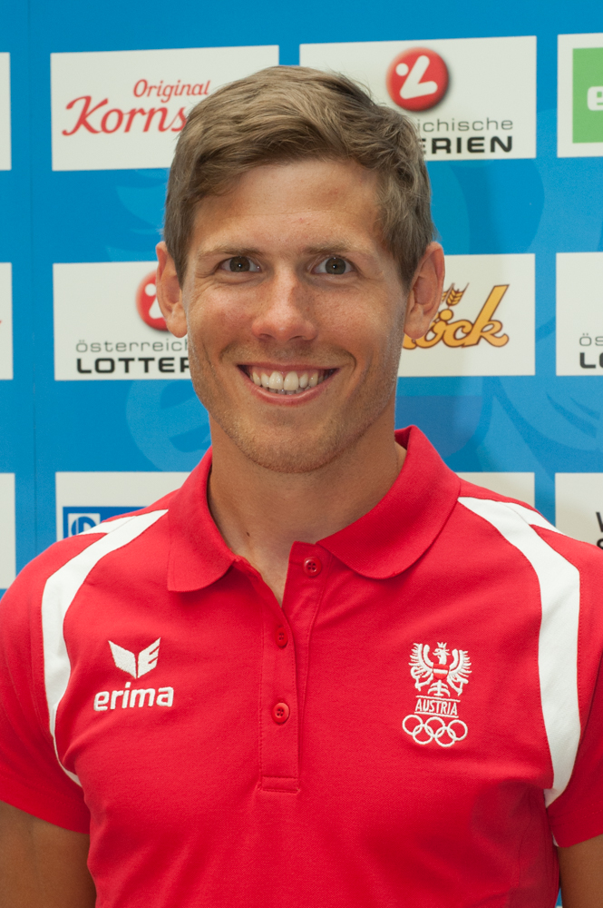 Einkleidung der Österreichischen Teilnehmer an den Olympischen Sommerspielen 2016 am 16./17. Juli 2016 in Wien. Bild zeigt Paul Sieber.